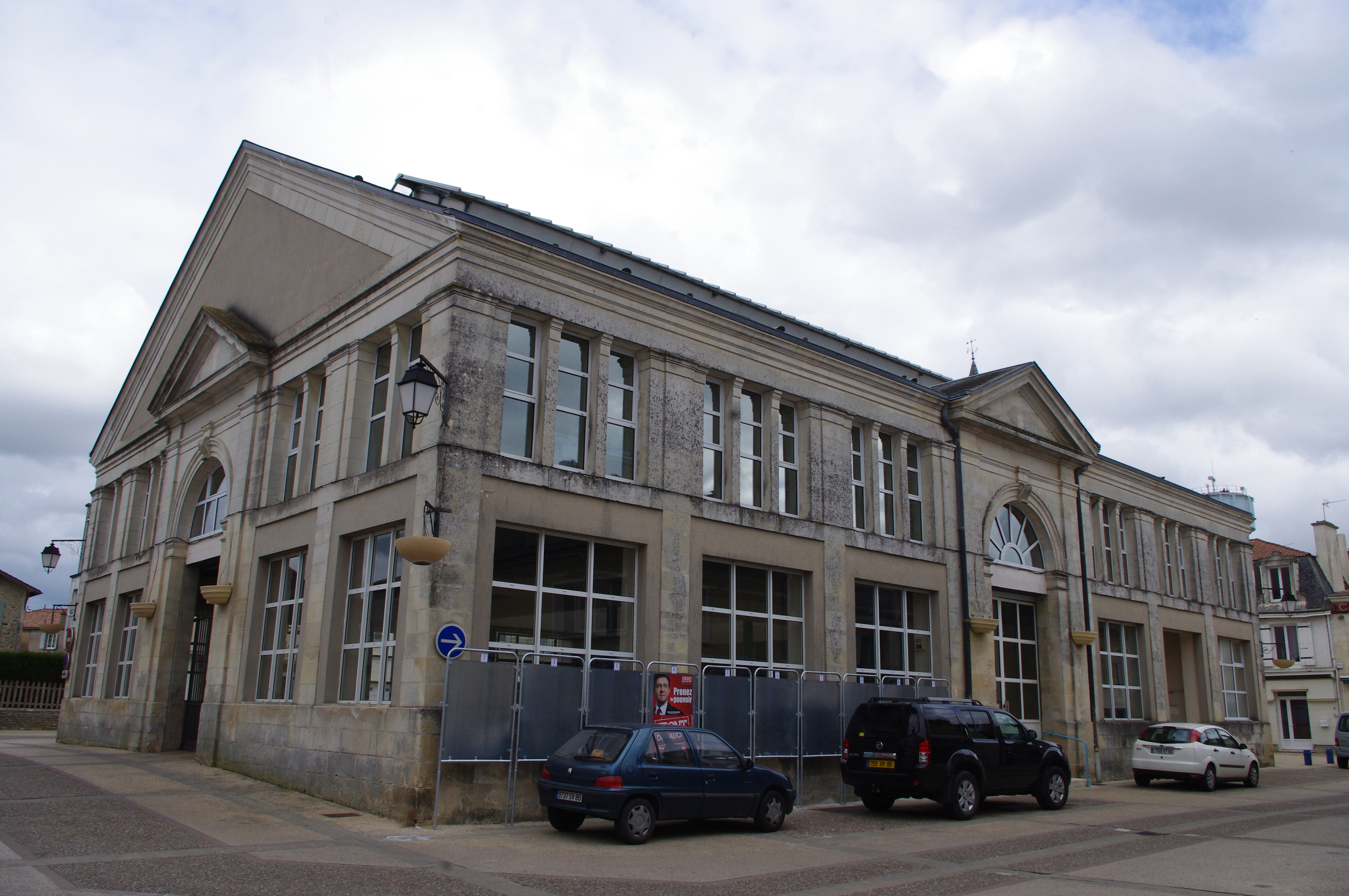 Halles et Mairie de Gençay, Vienne (France)